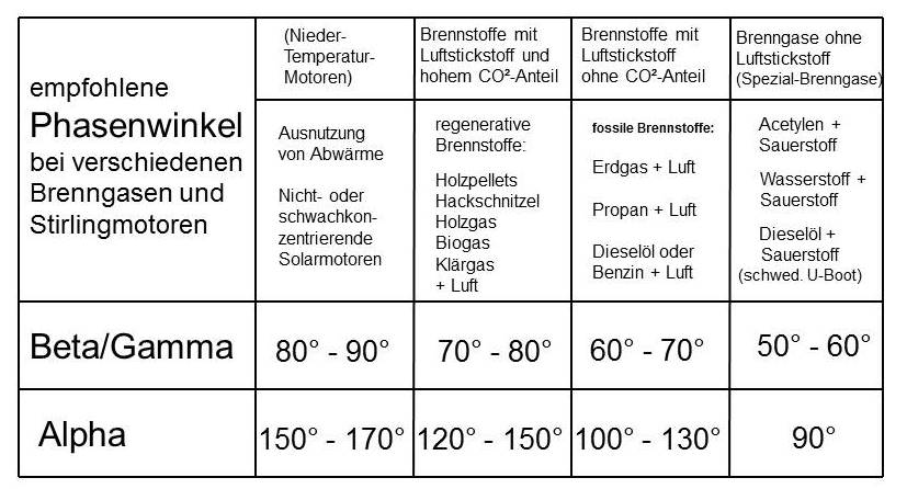 Liste von empfohlenen Phasenwinkeln bei verschiedenen Brenngasen und Stirlingmotoren